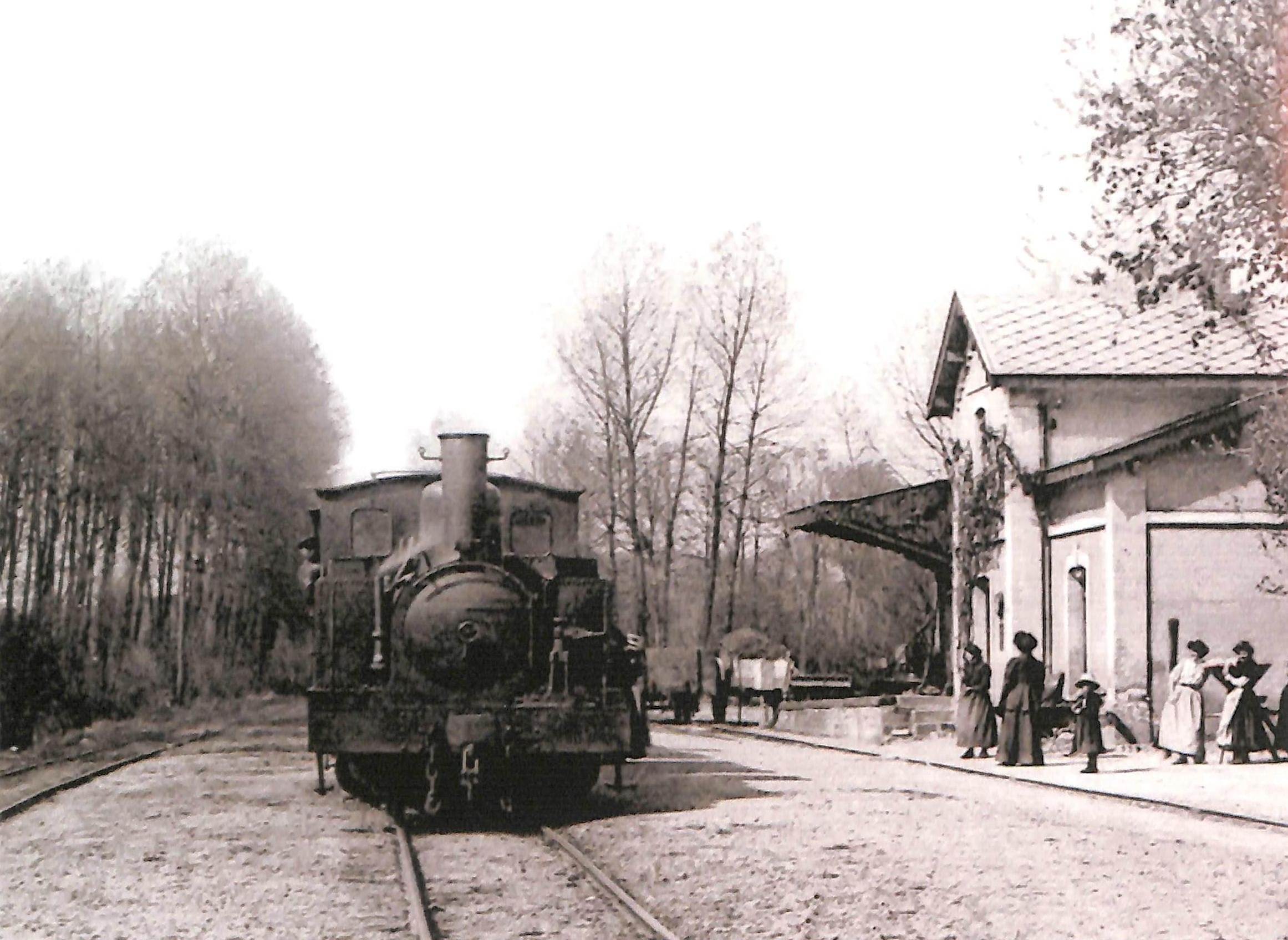 Ancienne gare de Nesles-la-Vallée dans les années 1920 / Locomotive 031T / Ligne de Valmondois à Marines / France.